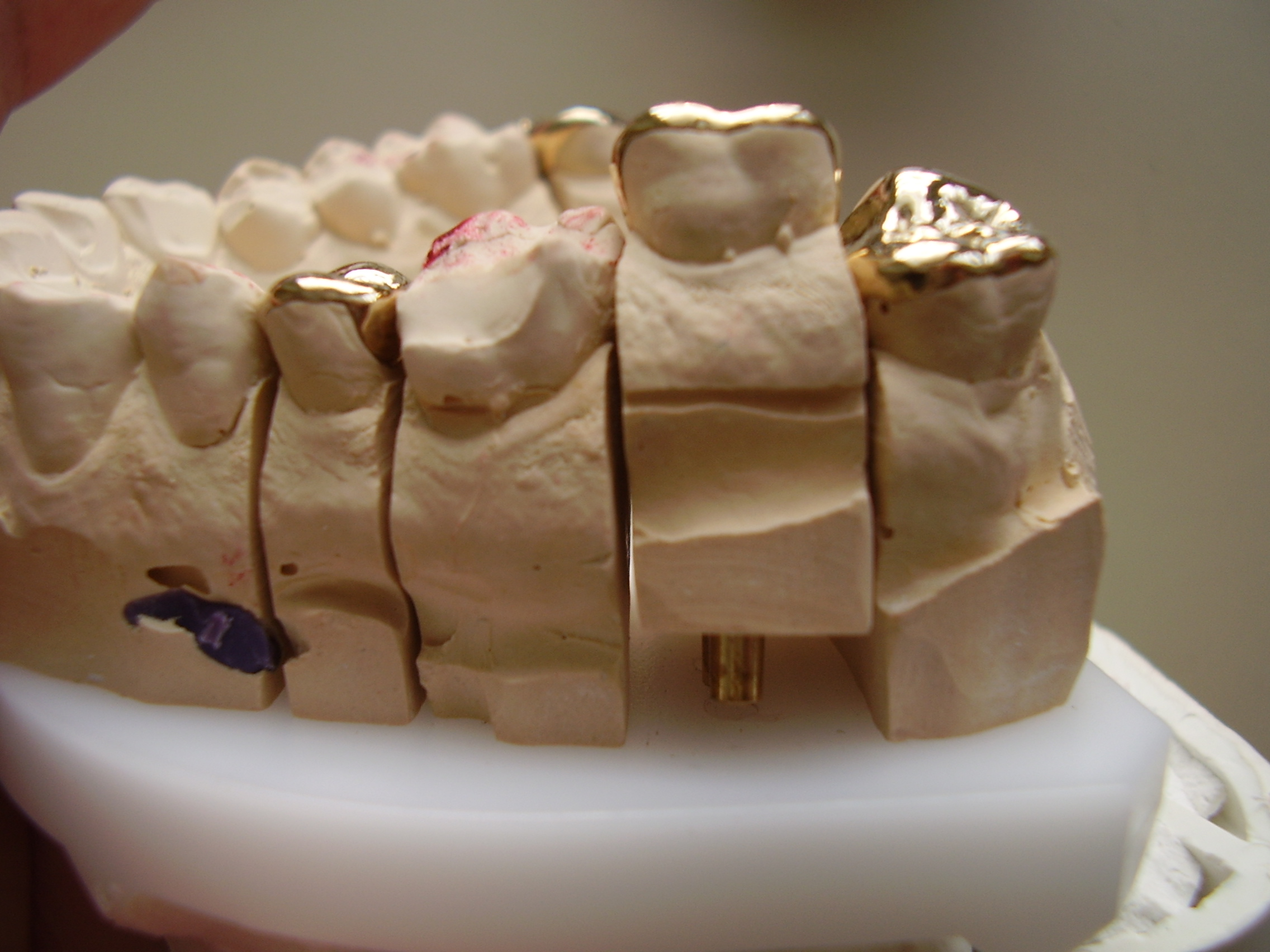 making of inlays, Sägemodell, Sägestumpf 1cm angehoben, unten sieht man einen von zwei Messingstiften, mit denen der Sägestumpf in exakter Position auf dem Modell fixiert wird